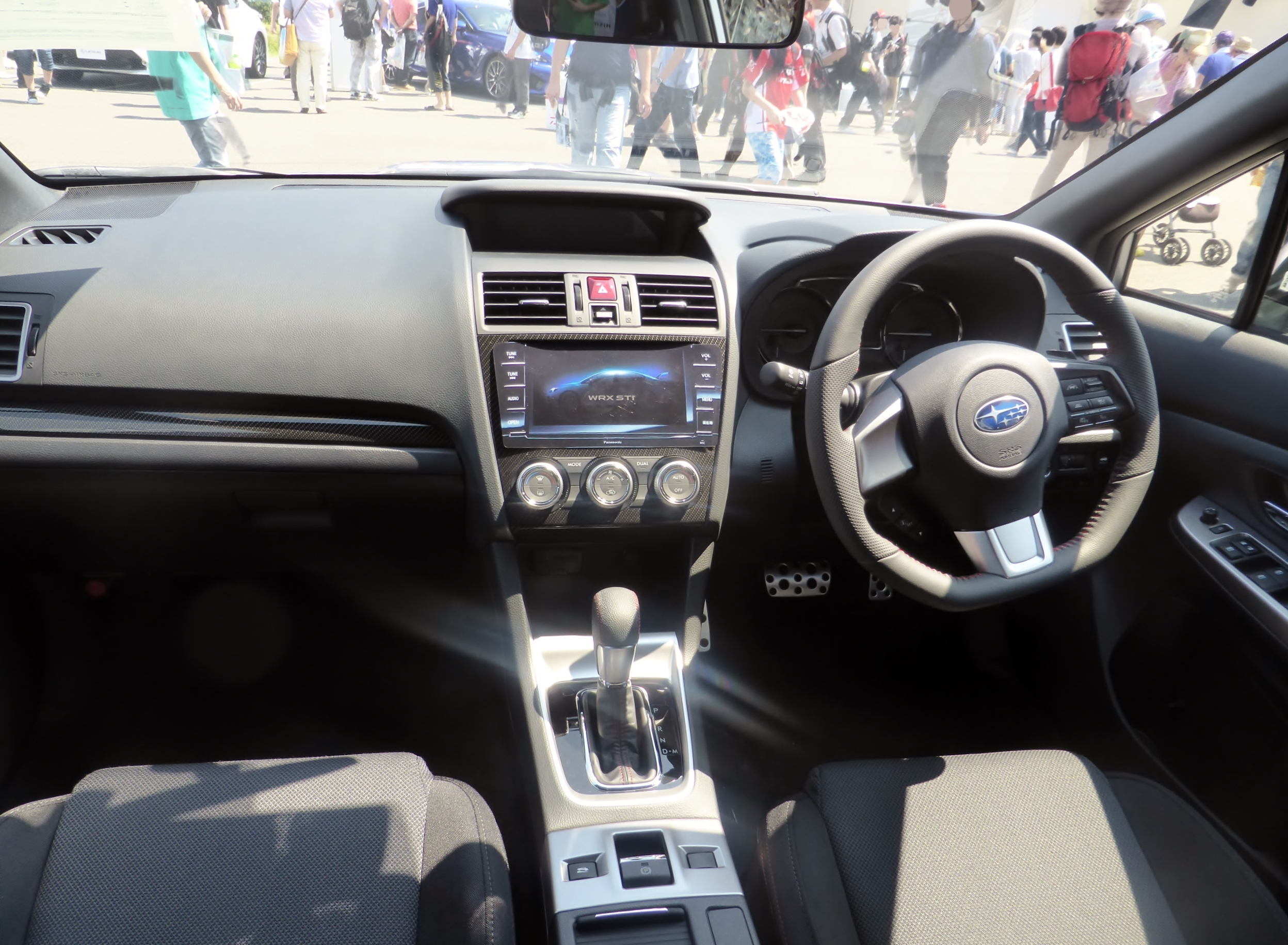 VAG型スバル・WRX S4 2.0GTアイサイトのインテリアを撮影。